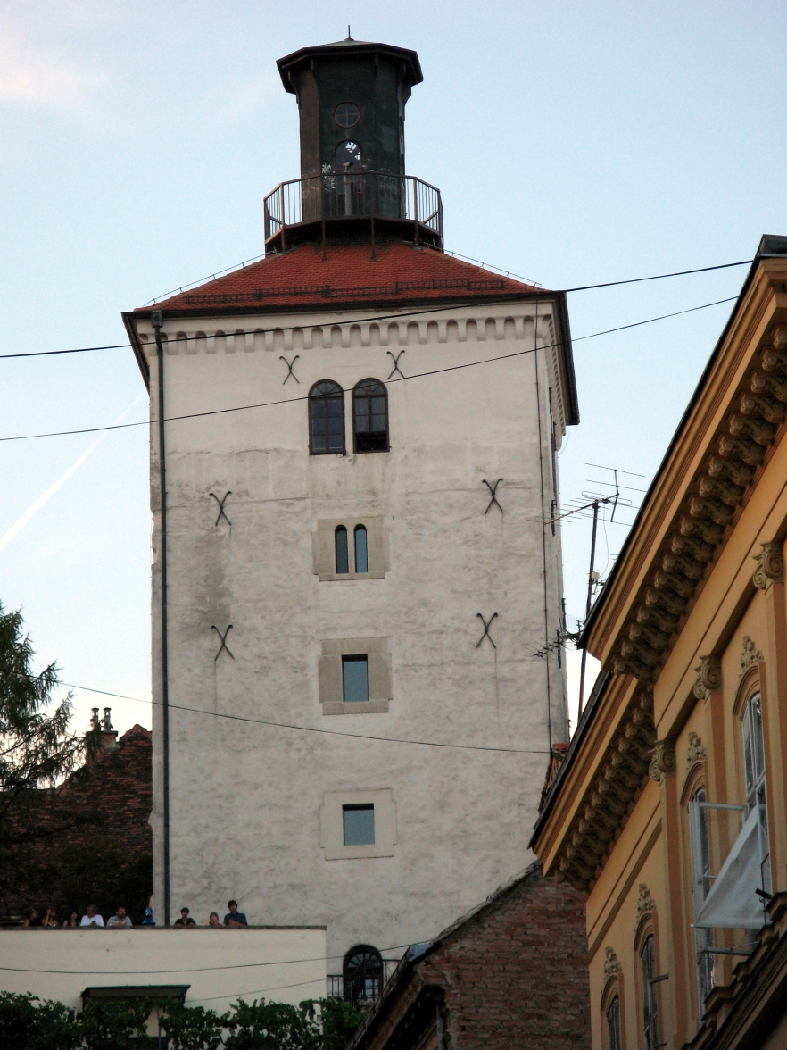 kula Lotršćak, Zagreb